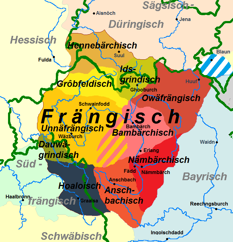 Aufgliederung in Subdialekte